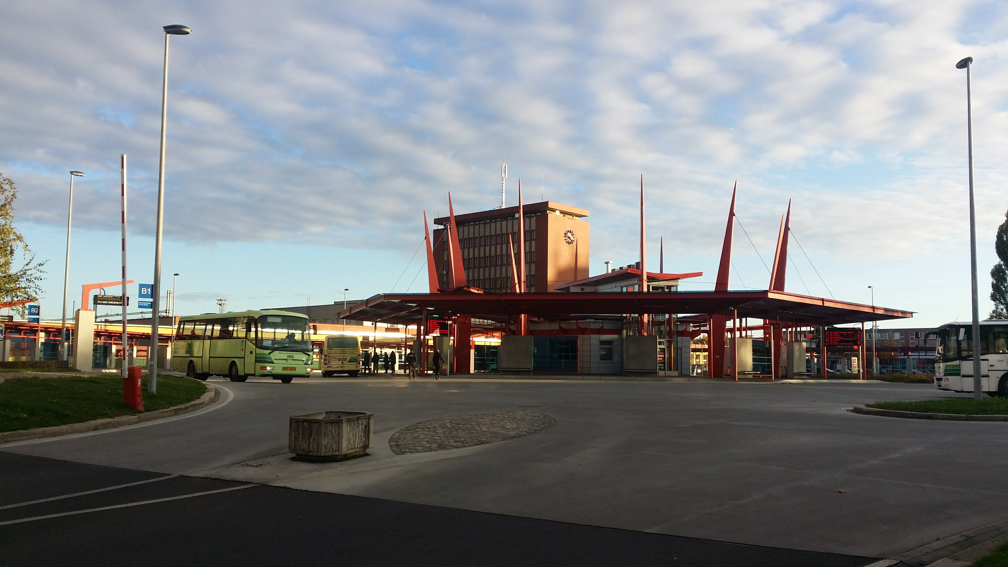 Autobusový terminál, vnitřní okruh pro MHD, vnější pro meziměsto, v pozadí věž vlakového nádraží